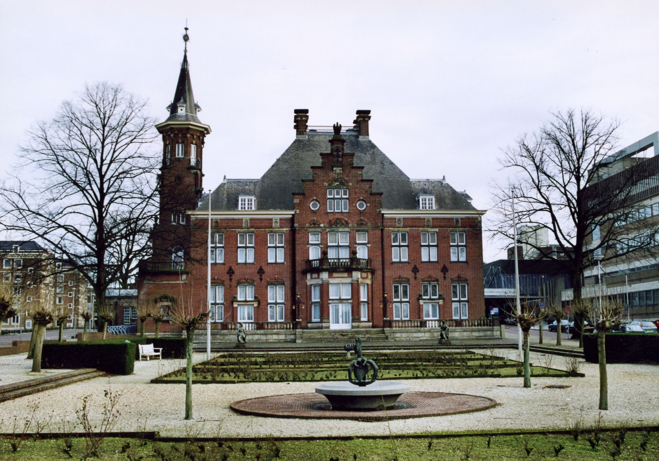 Huis Heyendaal te Nijmegen.